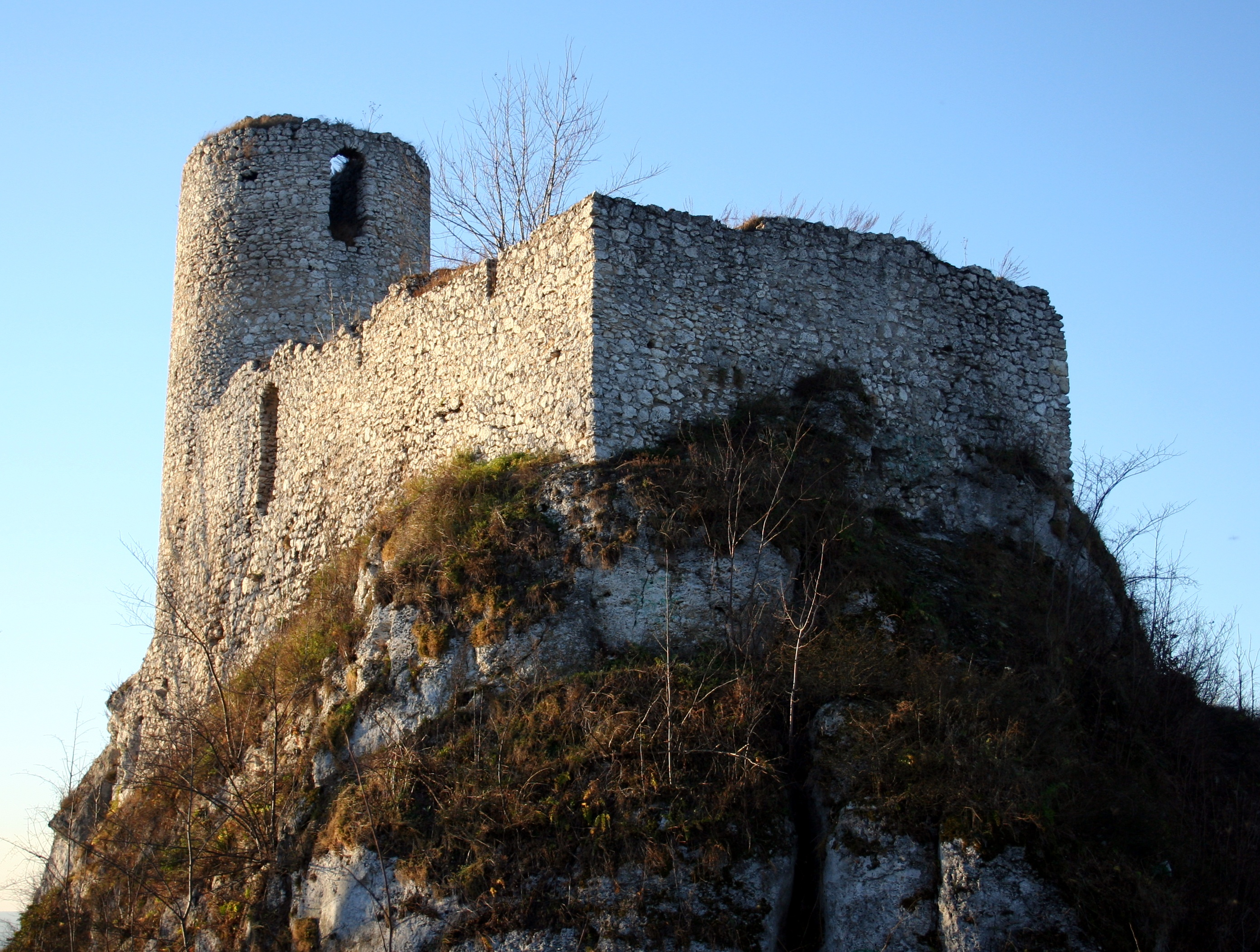 Ruiny zamku w Smoleniu